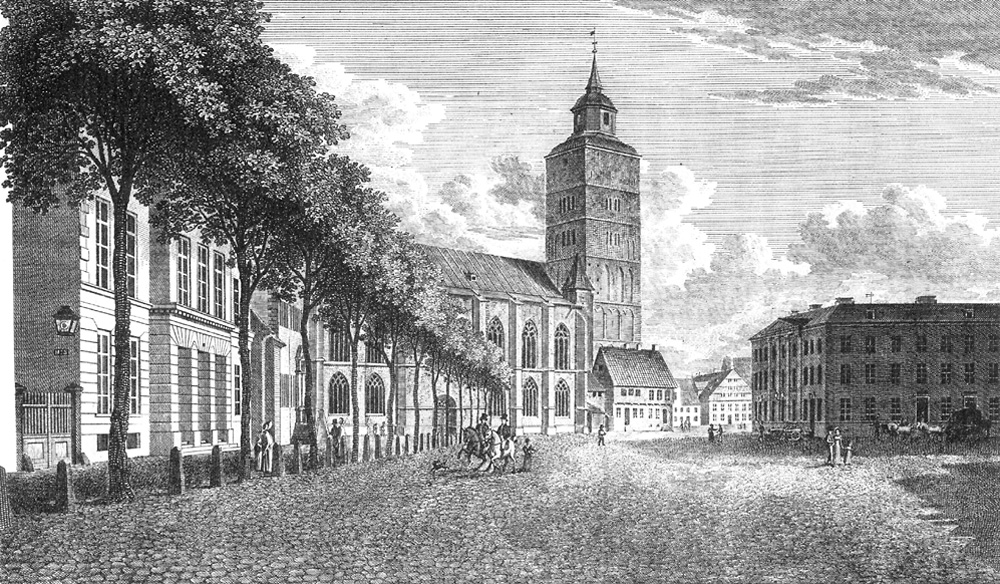 Bildvorlage von Anton Radl (1774–1852) aus dem Jahr 1818/1819: Domshof mit dem „zum Stadthaus modernisierten alten Palatium“ (rechts)